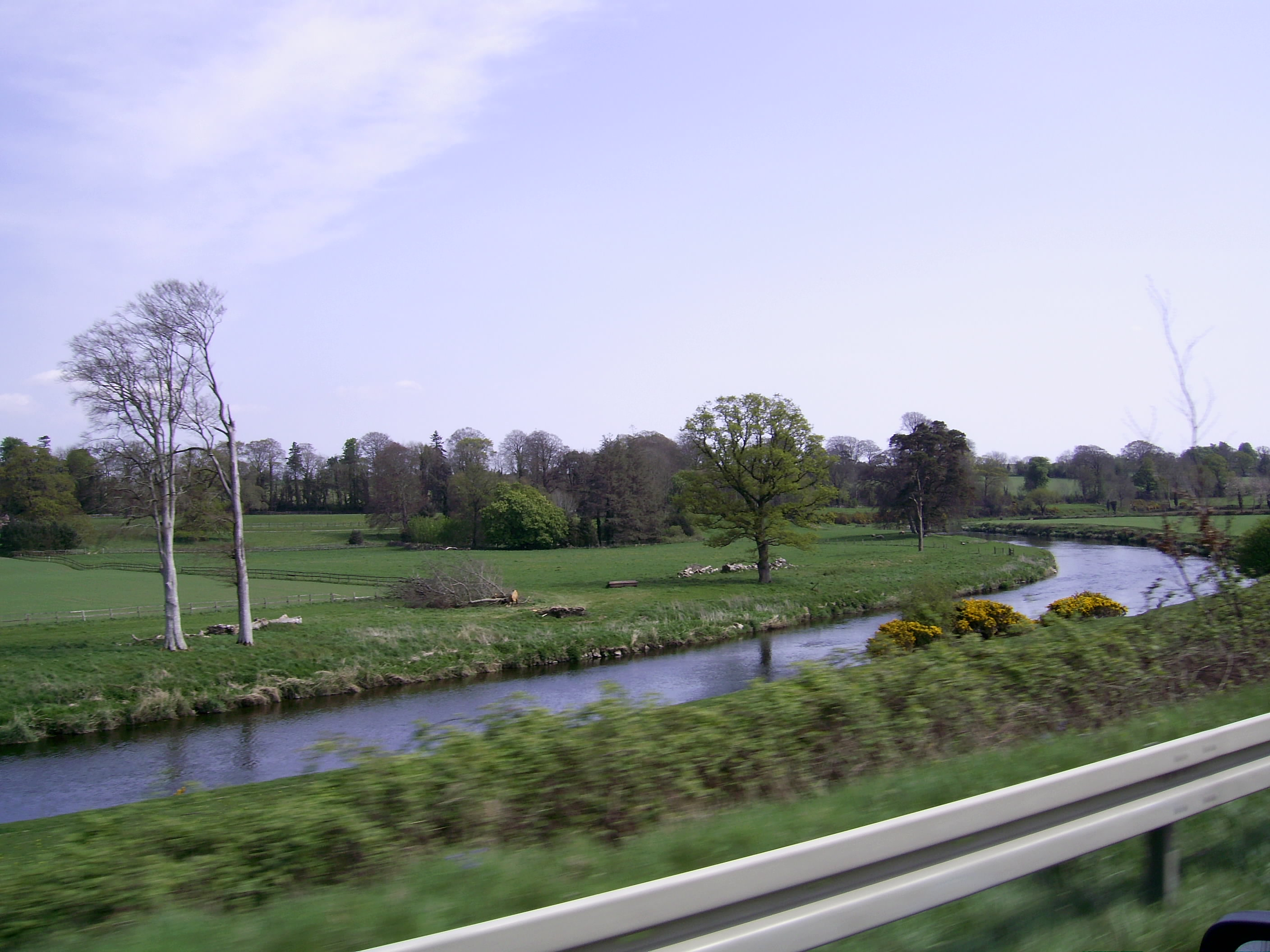 Le_Slainey.jpg